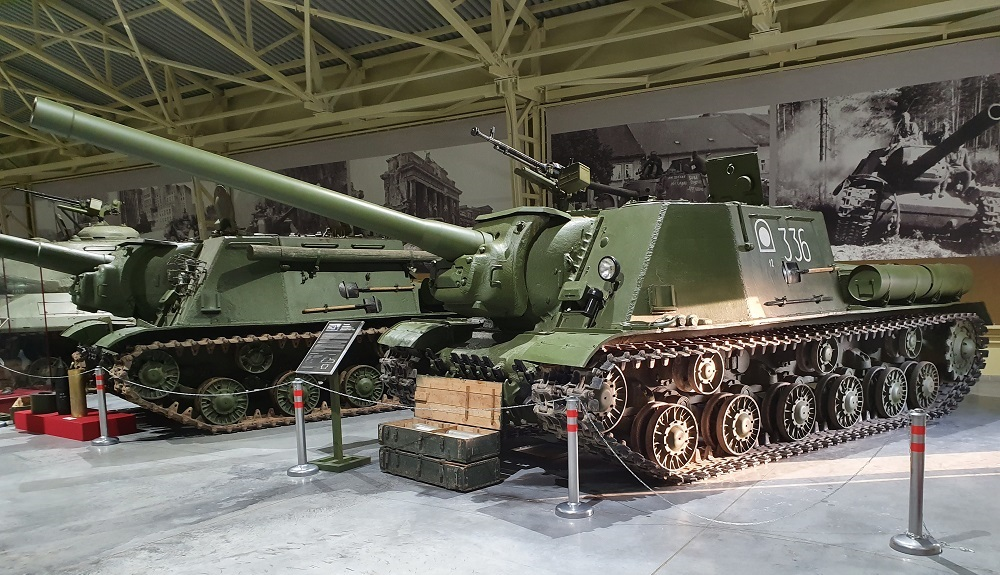 Тяжелая самоходно-артиллерийская установка ИСУ-122